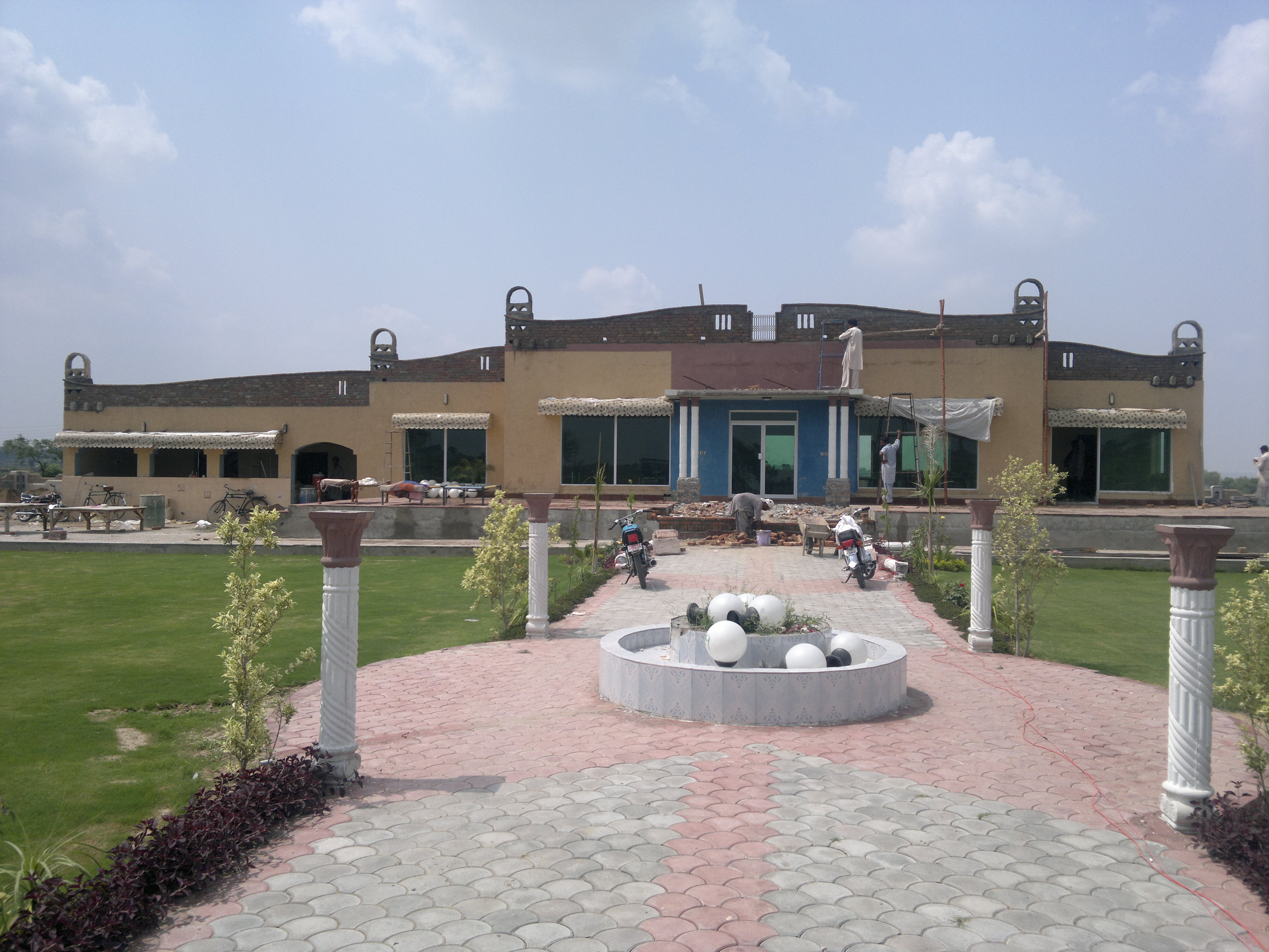 Chakwal, Pakistan